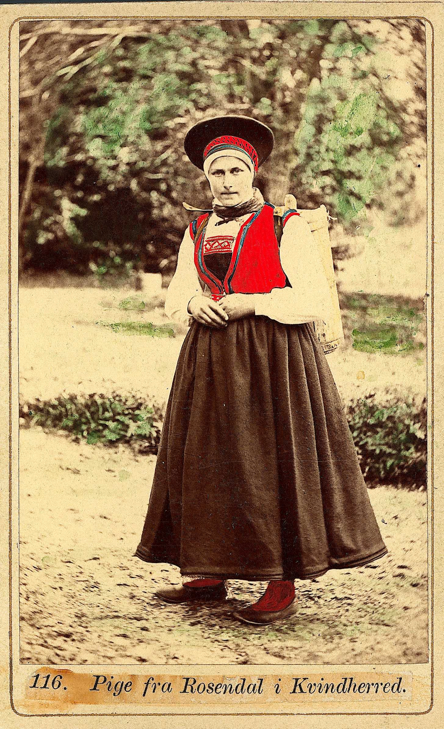 Jentedrakt, fra Rosendal, Kvinnherad. Portrett av jente/kvinne stående utendørs i naturen med bæreredskap på ryggen, antakelig en lagget ryggbøtte for melketransport. Håndkolorert. Fra serien "Norske Nationaldragter" tatt av fotograf Marcus Selmer (1819-1900), Bergen. Billedarkivet Norsk Folkemuseum.